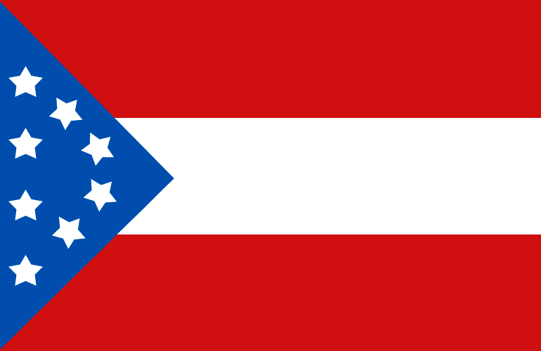 Bandeira do município de barreirinha.